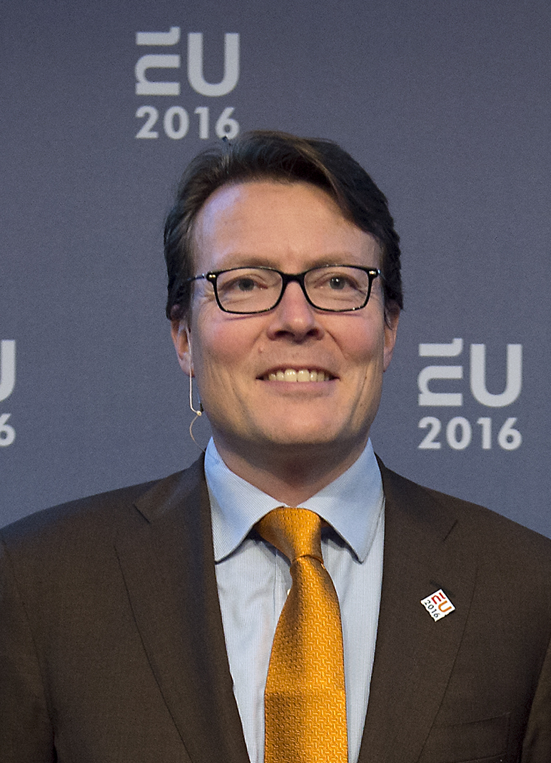 Nederland, Amsterdam, 20160602 Conferentie"Digital and open government: next step to maturity" Foto: Kick Smeets / (c) Rijksoverheid 2016